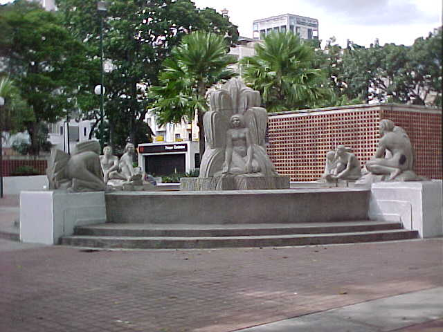 Parque Carabobo en el municipio Libertador, Distrito Capital - Venezuela (2000)